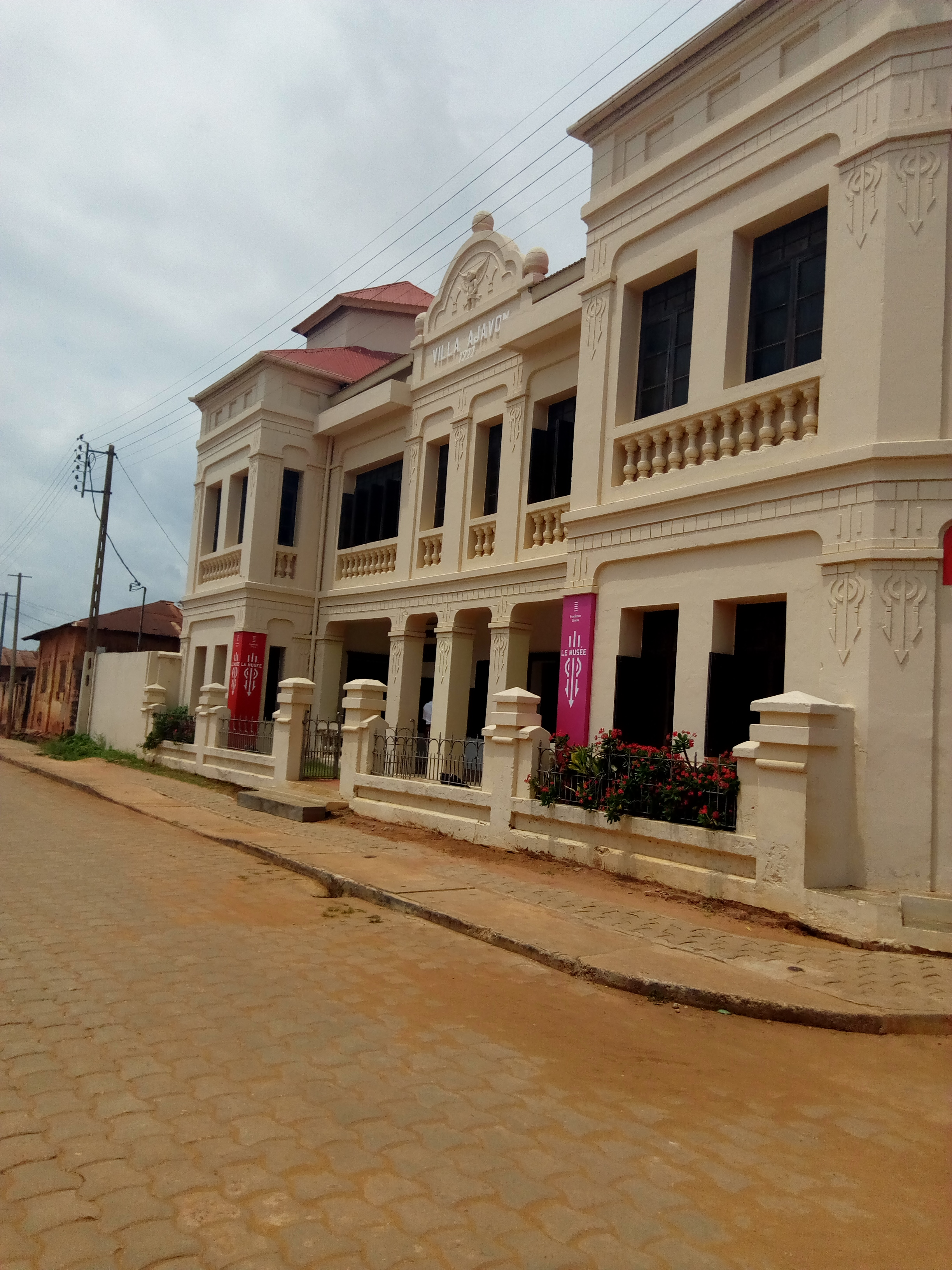 La villa Ajavon, datée de 1922, est l’un des témoignages majeurs de l’élaboration d’un langage architectural original, nourri de syncrétisme : le style afro-brésilien. Elle est également le reflet de la transformation urbaine, économique et sociale d’une ville côtière africaine après l’abolition de l’esclavage. Wikidata has entry Q67919824 with data related to this item.